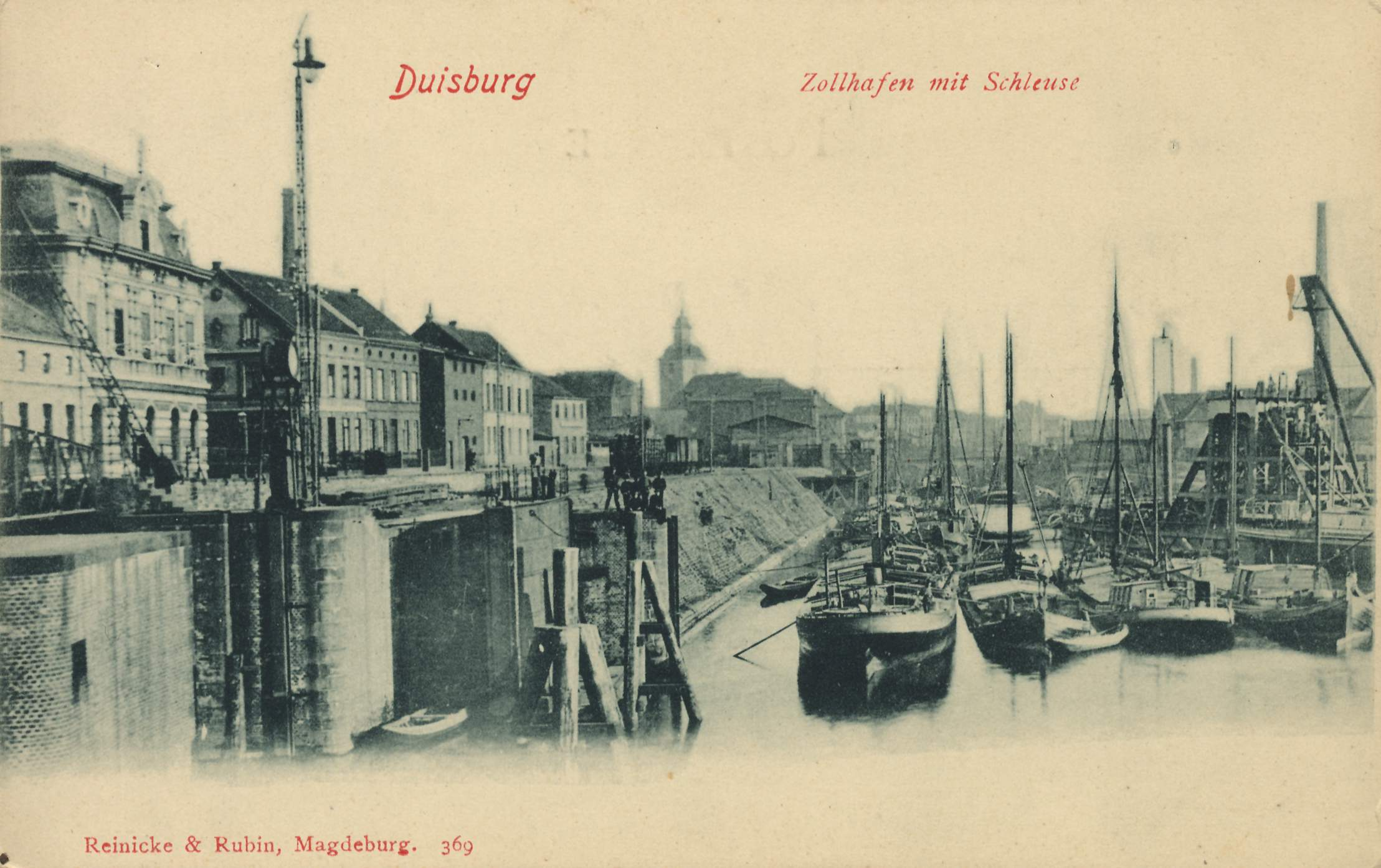 Historische Postkarte von Duisburg aus dem Verlag: Reinicke & Rubin, Magdeburg